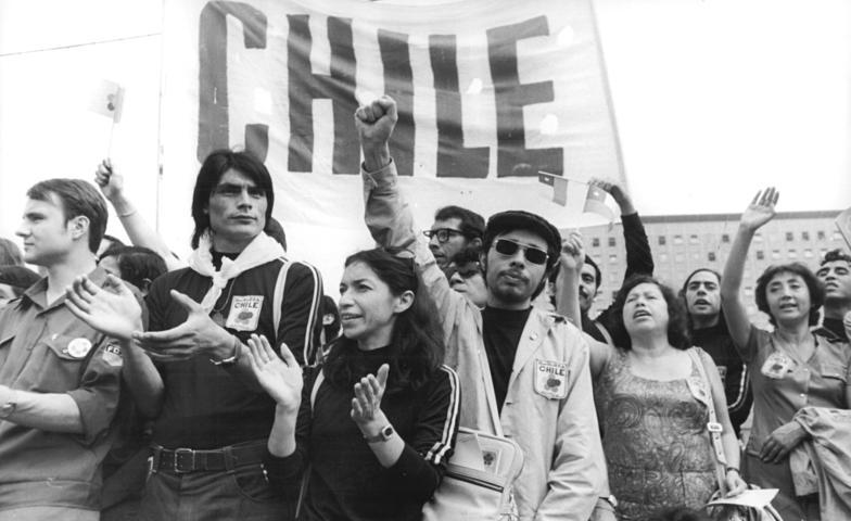 Berlin, 10. Weltfestspiel, Demonstration ADN-ZB Sindermann 4.8.73 Berlin:Festival-Demonstration-Vor den Augen der Weltjugend und den Repräsentanten von Partei-und Staatsführung der DDR legte die junge Generation der DDR am 4.8.73 ein machtvolles Bekenntnis zu ihrem Staat ab.Zu den Gästen des Festivals der Weltjugend und den Teilnehmern der fasnziniernenden Parade gehörte auch Gladys Marin aus Chile, Generalsekretär der Kommunistischen Jugend Chiles und Mitglied des Polibüros des ZK der Kommunistischen Partei Chiles(Bildmitte) .